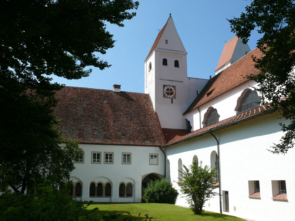 Stiftskirche St. Johannes d. T. (Steingaden) mit Kreuzgang